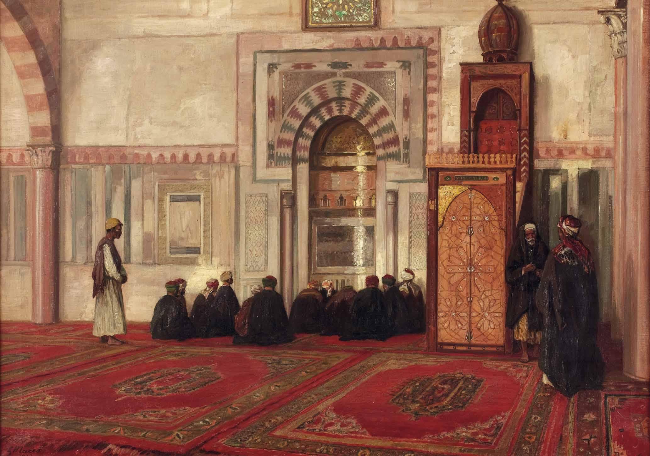 In der Moschee Ibrahim Agha (Kairo). Signiert und datiert: G. Macco 1922, Öl auf Leinwand, ca. 77 x 109 cm